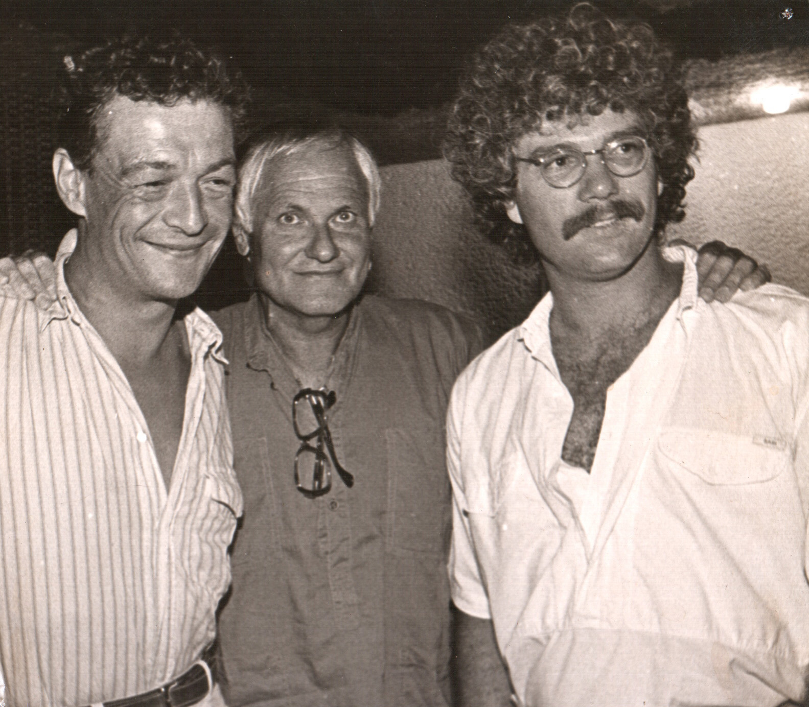 דורון ערן עם הבמאי ההונגרי, מיקלוש יאנשו, והשחקן הצרפתי, פיליפ לאוטרד על סט הצילומים של הסרט "השחר" (L'Aube) במגידו